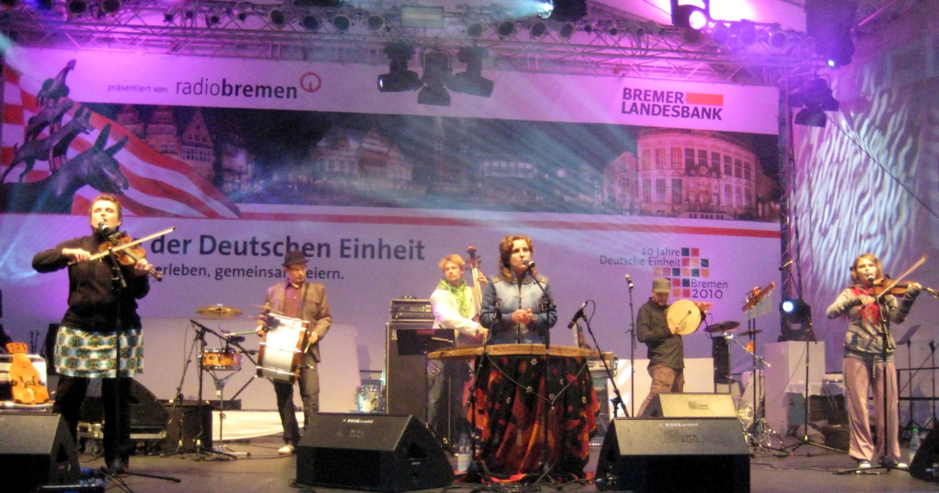 Die Warsaw Village Band bei einem Open-Air-Konzert auf dem Bremer Marktplatz am 2. Oktober 2010, im Rahmen des begleitenden Bürgerfestes zur im Jahr 2010 in Bremen stattfindenden, offiziellen Feier des 20. Tags der Deutschen Einheit.